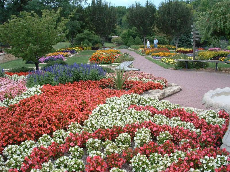 DubuqueBotanicalGardenArboretum.jpg